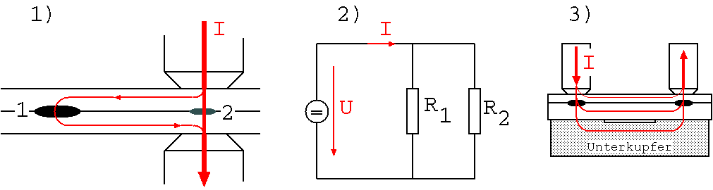 Widerstandsschweißen - Nebenschluss Andere Versionen